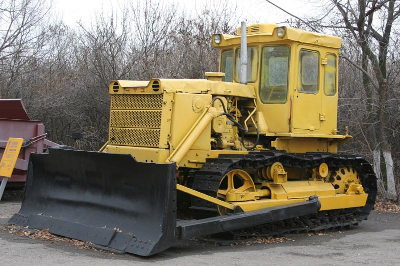 Трактор Т-130 в Саратове на Соколовой горе